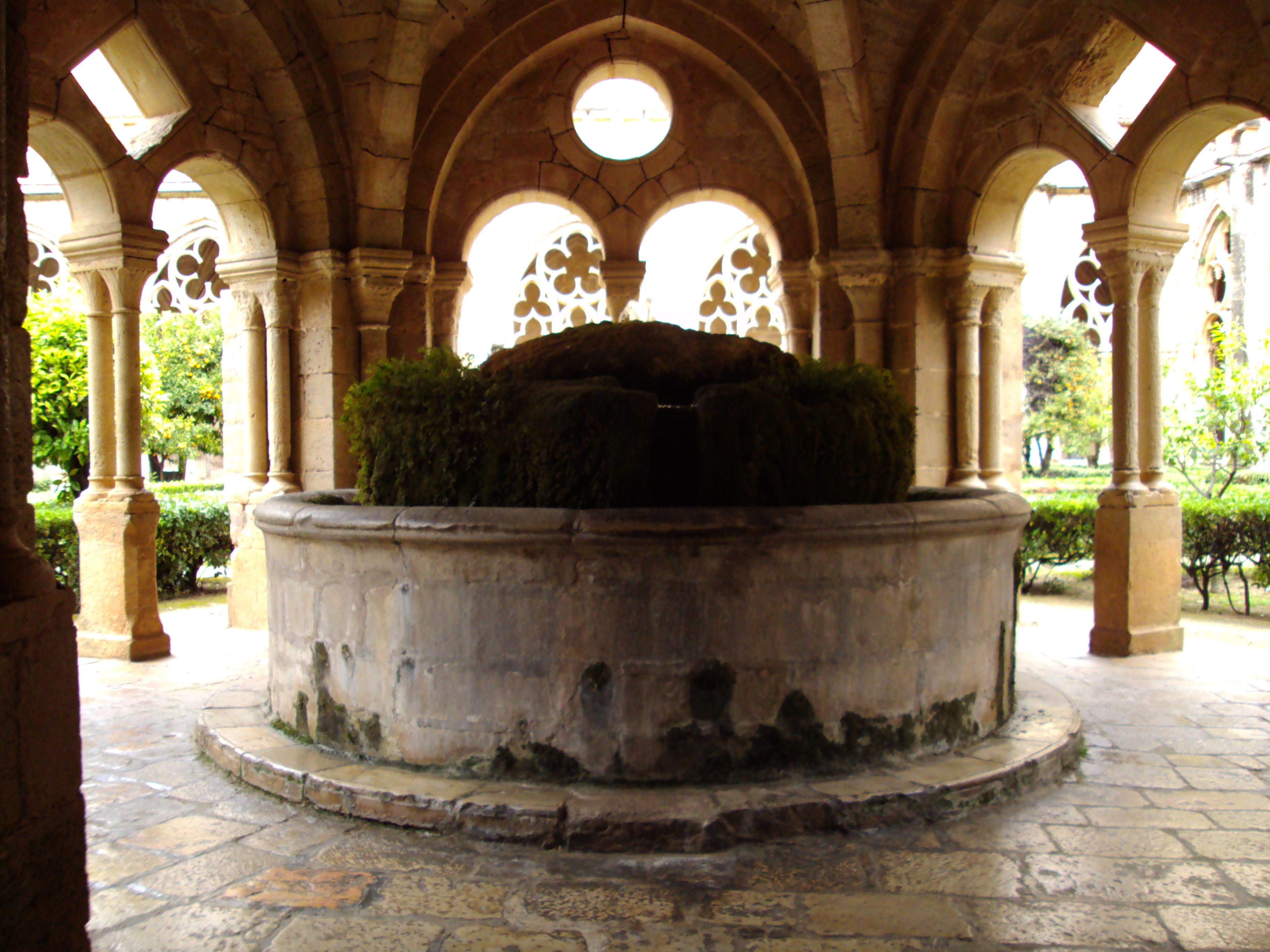 La font del templet del lavatori del Reial Monestir de Santes Creus. Està comunicat amb el claustre gòtic del monestir.